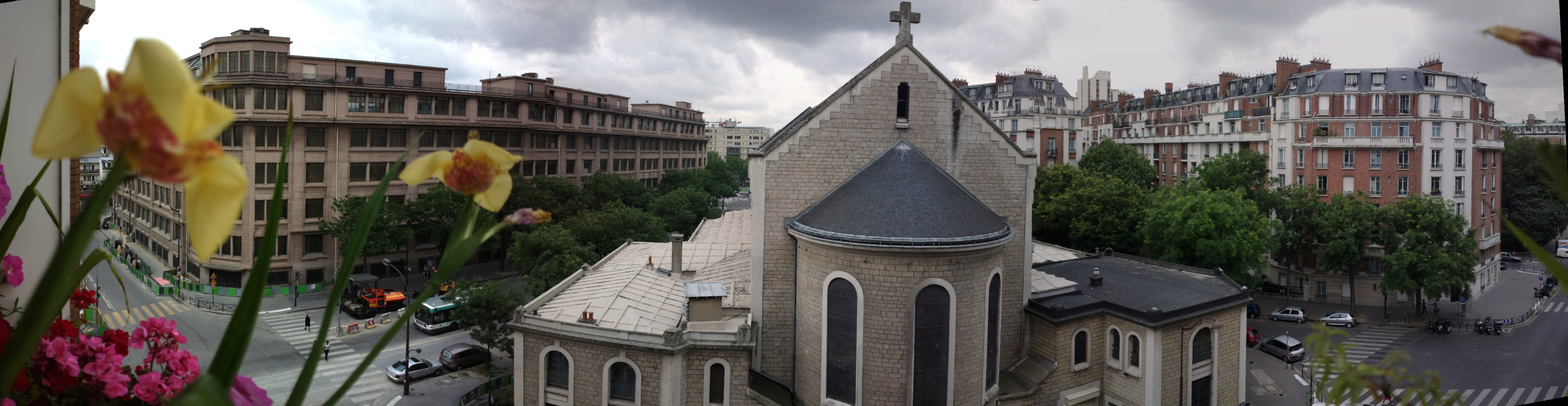 L'église catholique Saint-Gabriel et le lycée Hélène-Boucher vue de la Rue de Lagny (Paris 20ème). Vue de la Rue Mounet-Sully.